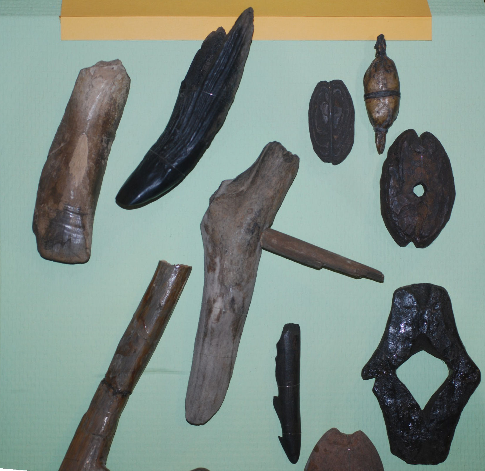 Sārnates apmetnes atradumi. Kaula un koka darbarīki